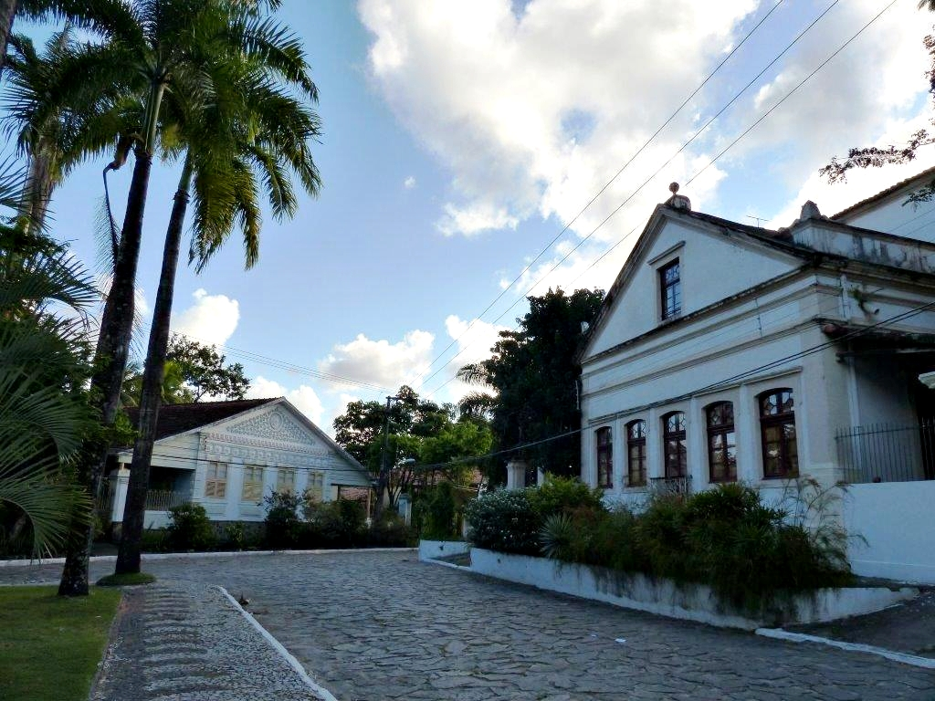 Bairro Poço da Panela, Recife, Brasil.